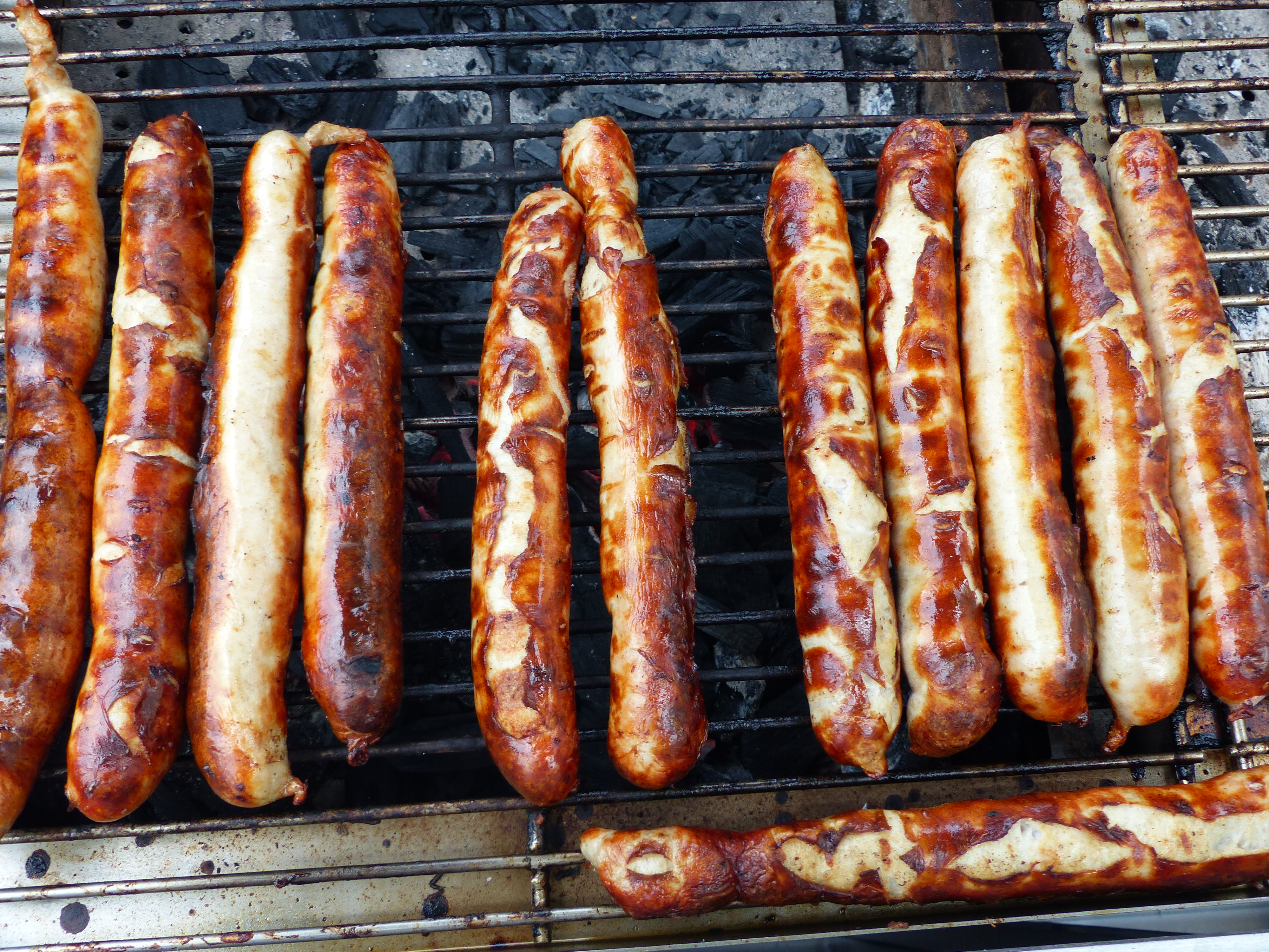 Thüringer Rostbratwurst, auf dem Markt in Weimar